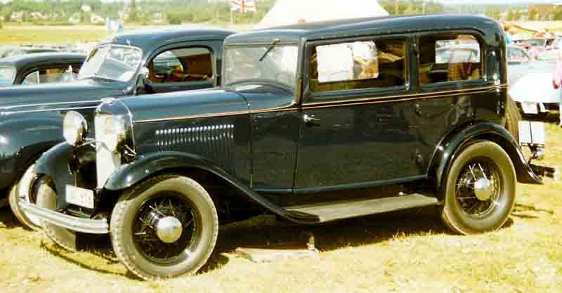 Ford Model B 55 Standard Tudor Sedan 1932